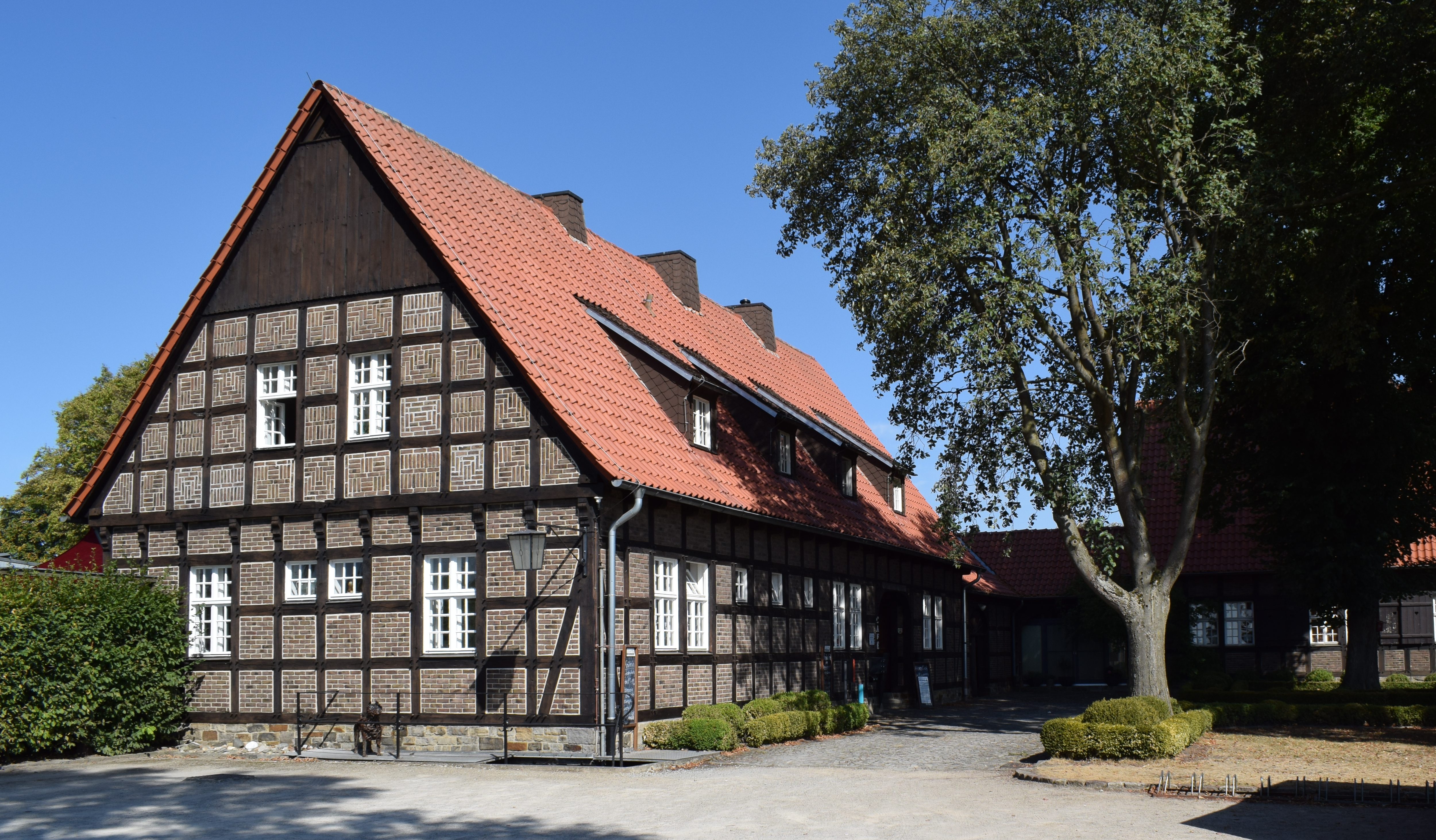 Ehem. Verstärkeramt in Wiedenbrück